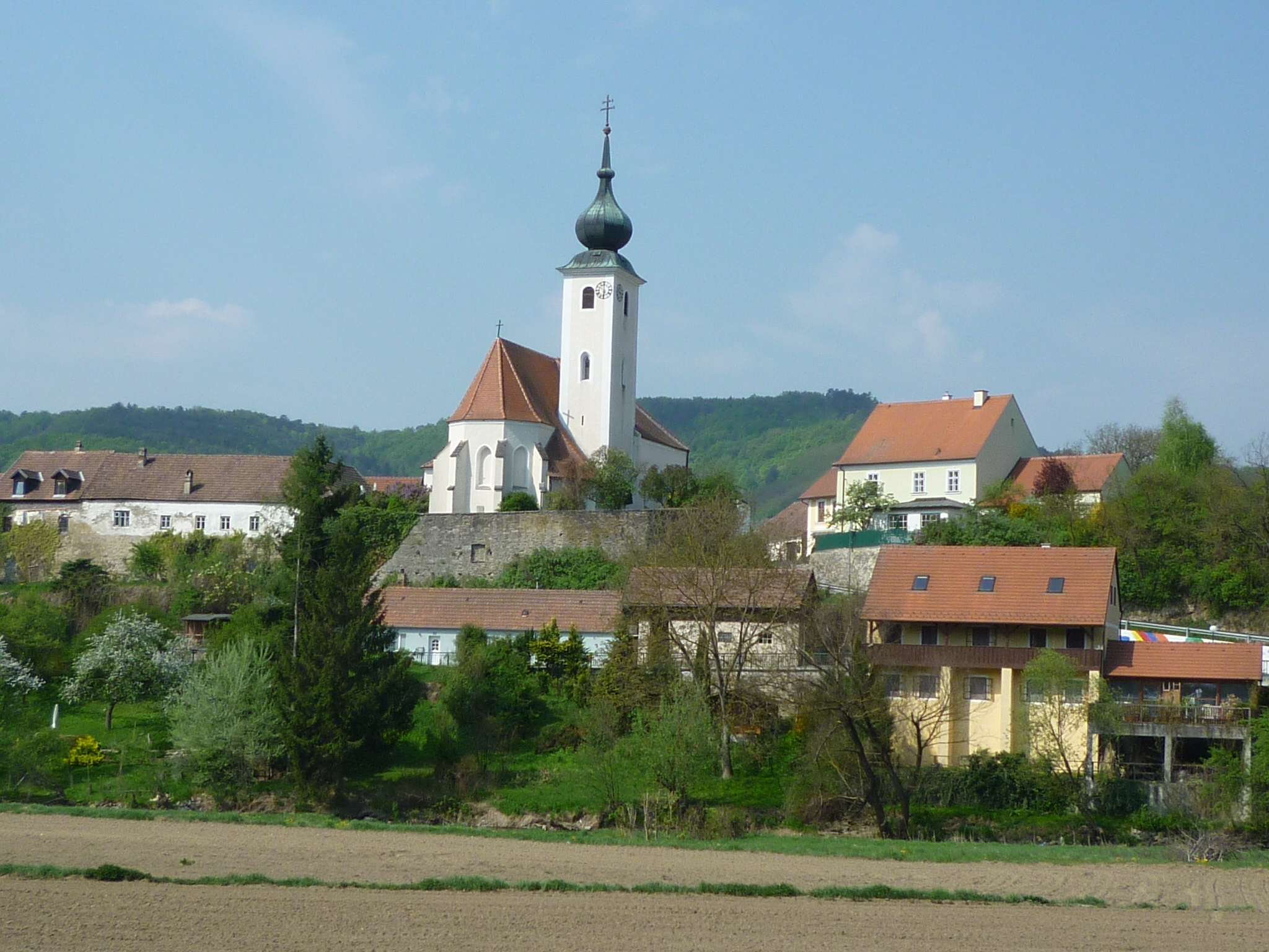 Stiefern, Gemeinde Schönberg am Kamp, Niederösterreich, Österreich